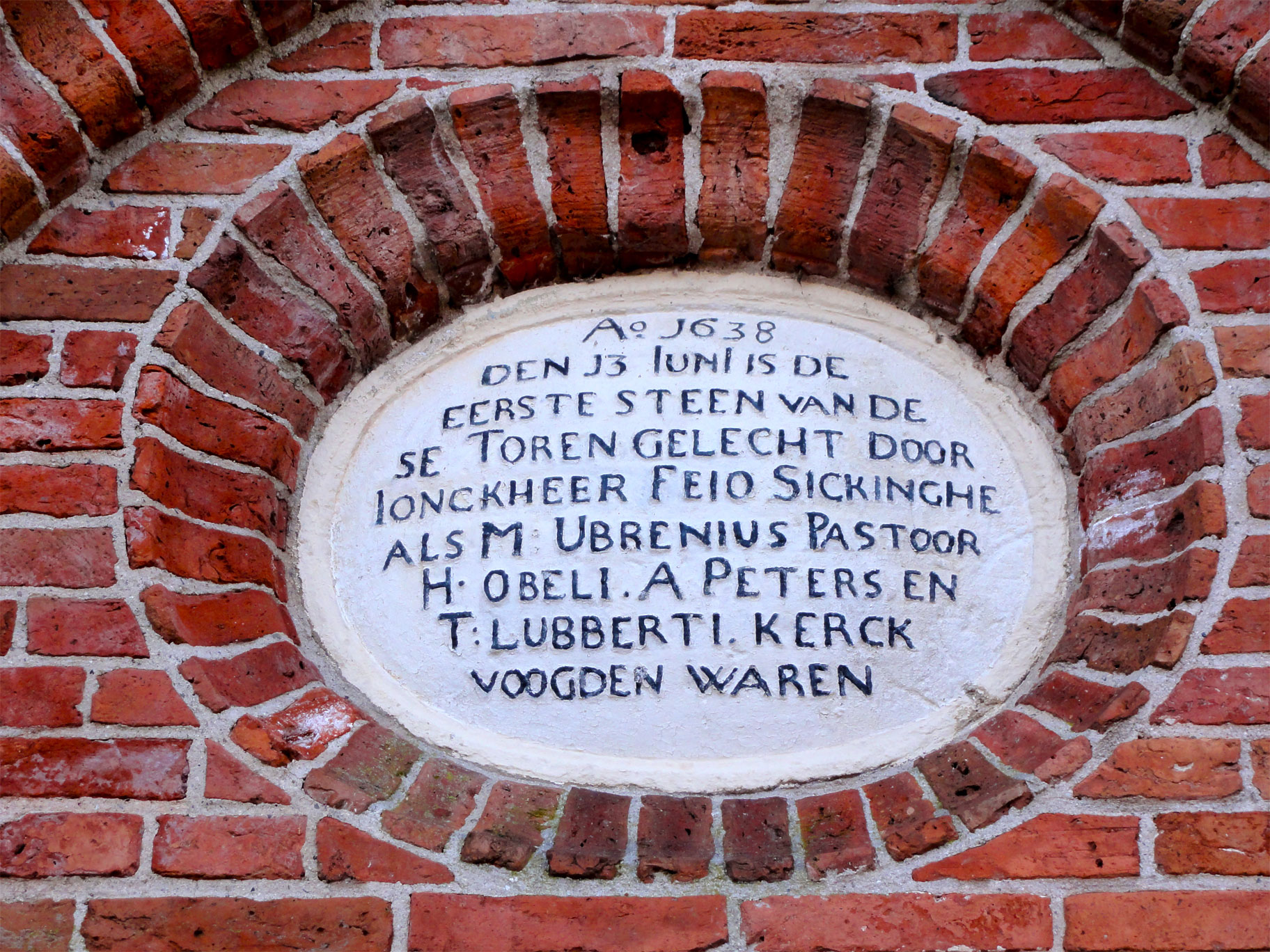 Steen Hervormde kerk Hoofdstraat 18 te Warffum